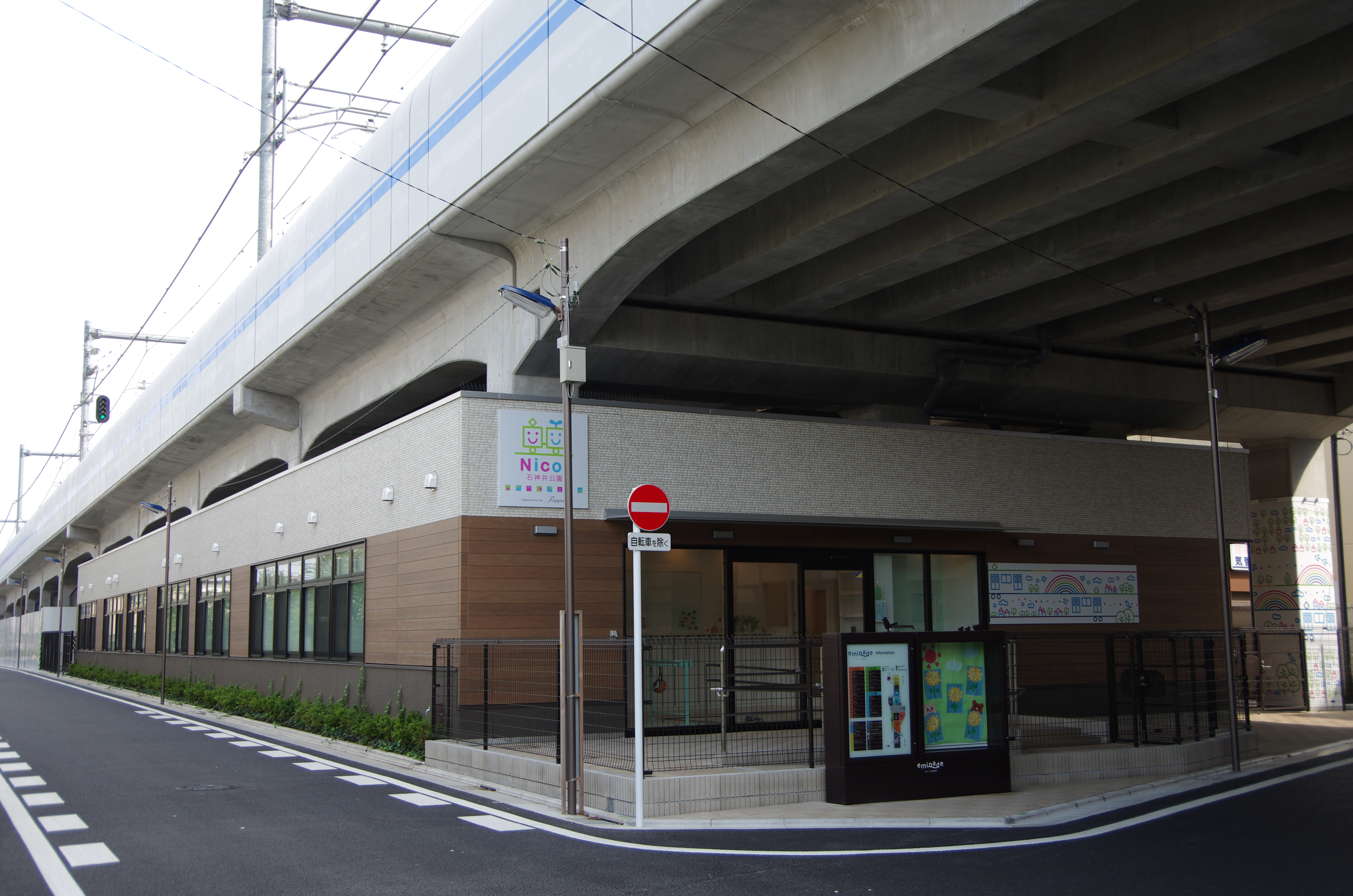 西武池袋線練馬高野台 - 石神井公園間の高架下に開設されているNicot石神井公園の外観（西側から臨む）